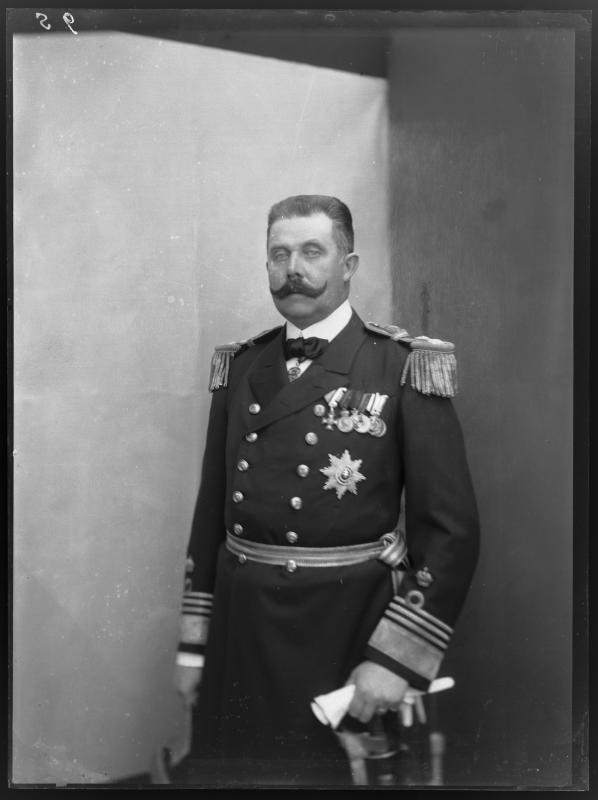 Franz Ferdinand, Erzherzog von Österreich-Este (1863–1914)